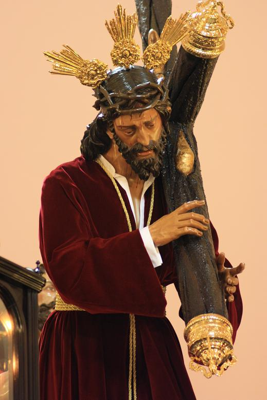 Ntro. Señor Jesús de las Penas